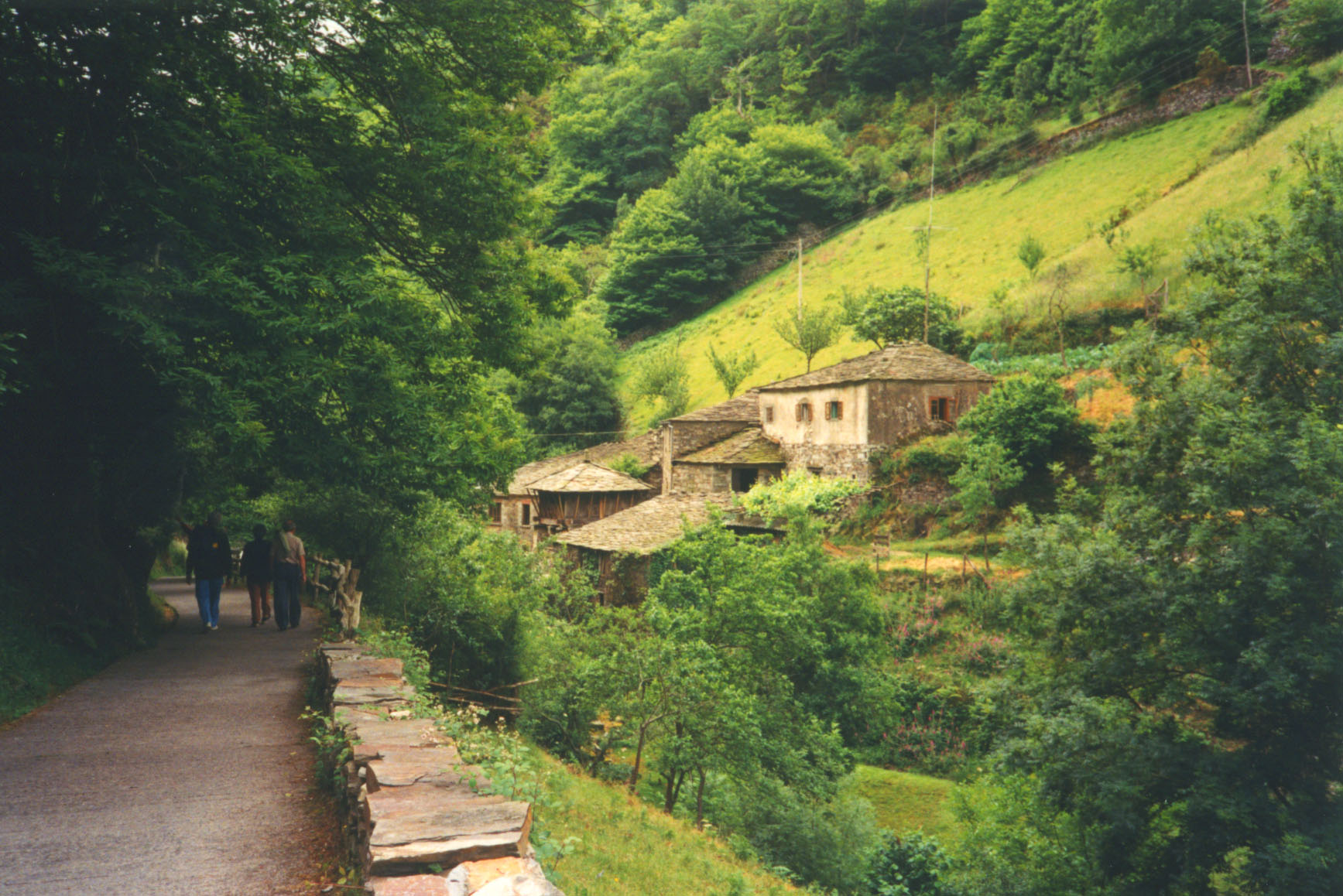 Taramundi (Asturias, España);fotografía en papelTaramundi (Asturias, Spain). Paper photograph.